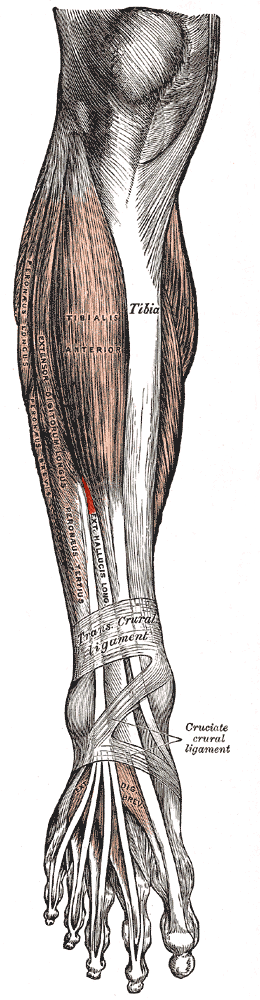 extensor hallucis longus muscle